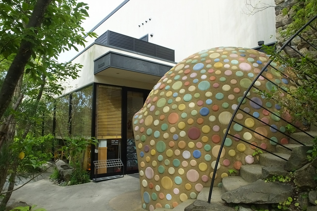 PATISSIER eS koyama - 8hanare&未来製作所 パティシエ エス コヤマ 小山進